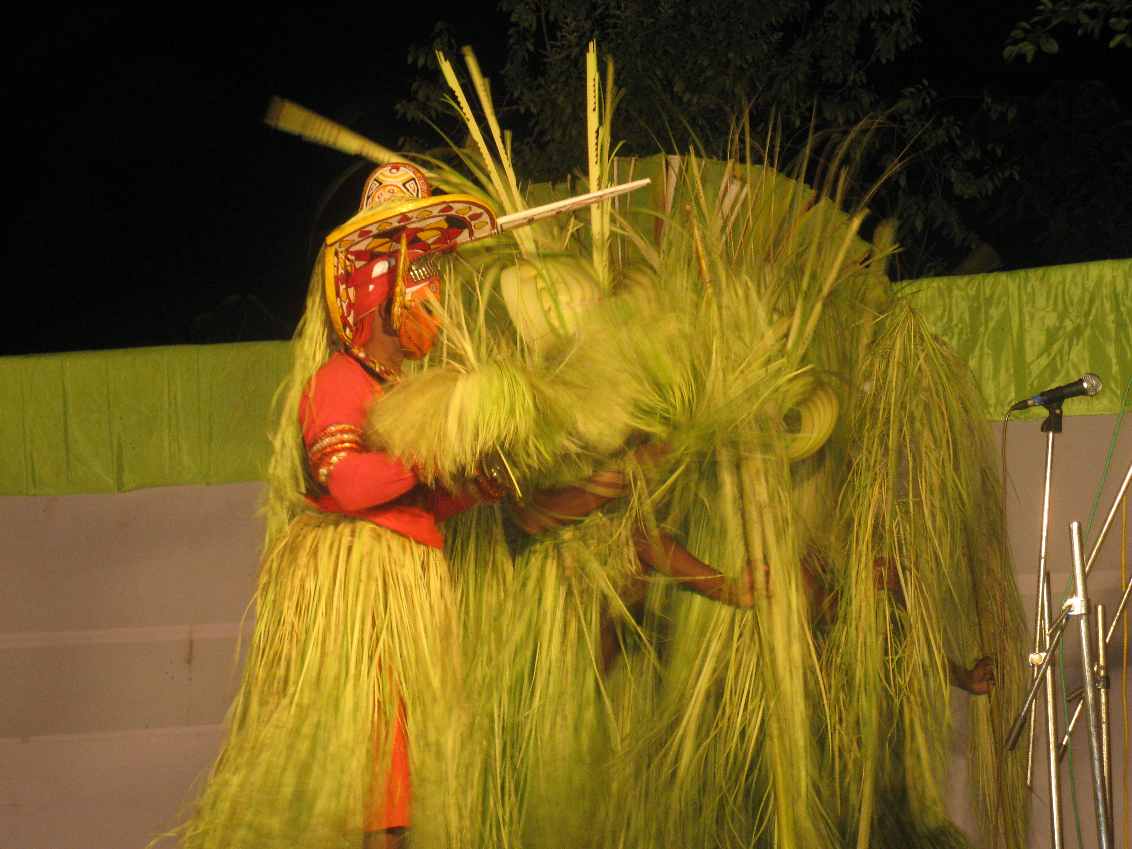 കണ്ണൂർ ജില്ലയിലെ മാടായി പ്രദേശത്ത് ശനി ബാധ ഒഴിപ്പിക്കുന്നതിനായി കെട്ടിയാടുന്ന മാരിത്തെയ്യങ്ങൾ